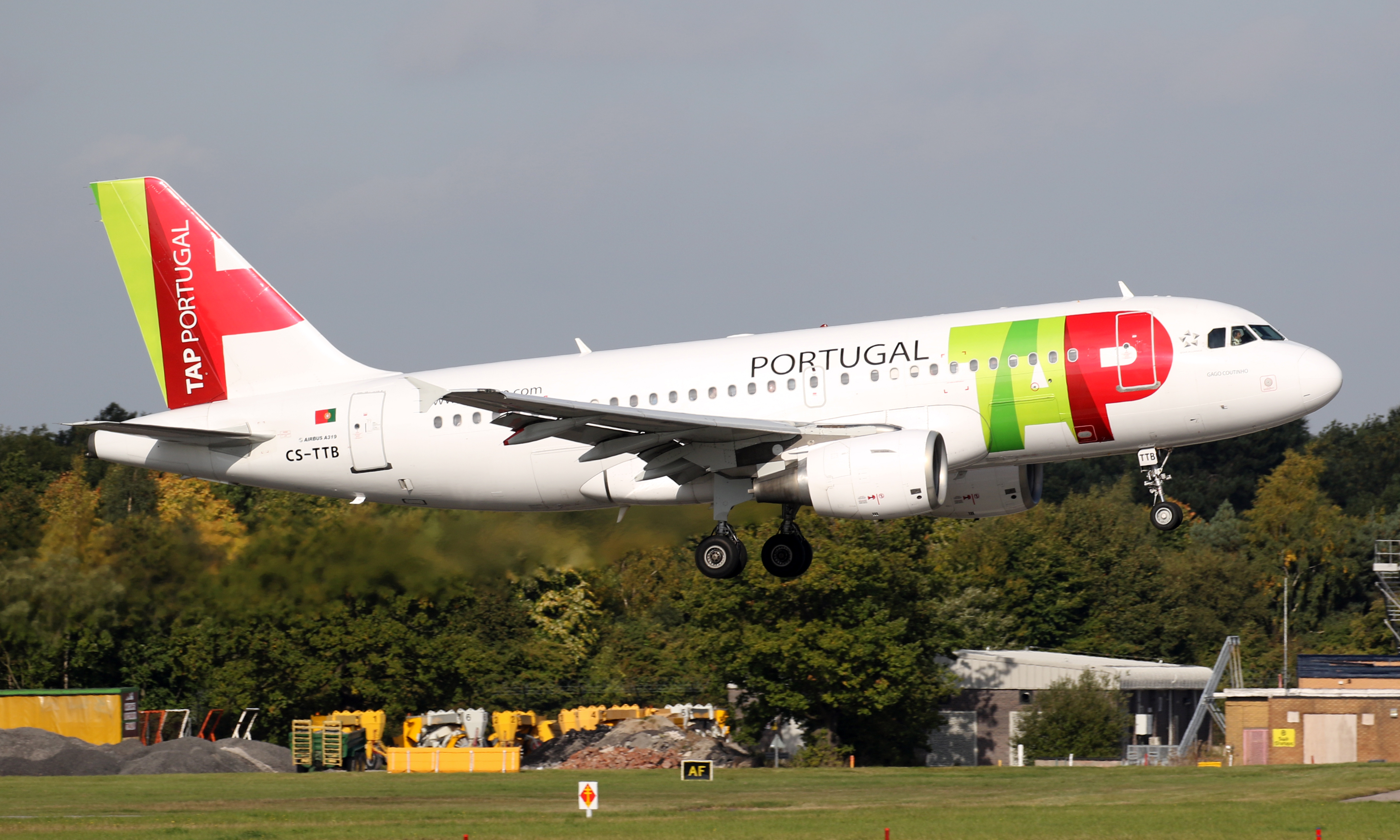 Manchester 28/09/15